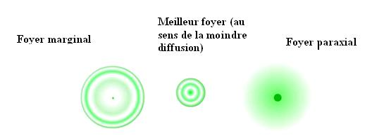 Aberration sphérique. Auteur : User:Supop